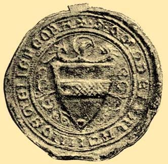 Amadé nádor pecsétje. Háromszögü pajzsban az Aba nemzetség czimere: a pólya. A körirat: † S(igillum) • OMODEI PALATINI DE GENERE OBA. Az országos levéltárból eredeti példányról.